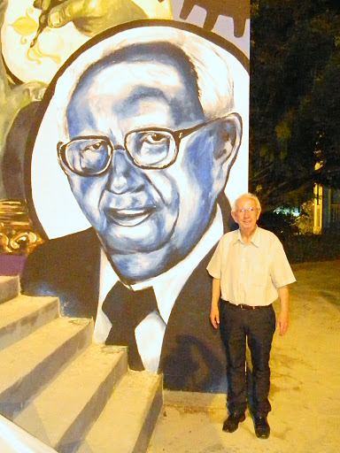 Enerson Xuxa Harger na inauguração do Palco Multiuso de Braço do Norte, em 22 de outubro de 2011